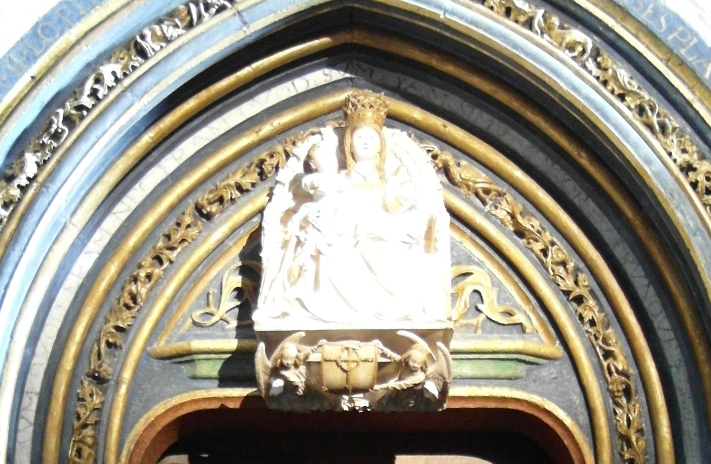 Kartause von Miraflores (erbaut 1441-1484), Tympanon des Klausurportals, Muttergottes mit Kind, Umschrift: SVM QVOD ERAM NEC ERAM QVOD SVM YAM SIMVL DICOR VTRVNQVE ("Ich bin, was ich war, war aber nicht, was ich bin; nun heiße ich beides zugleich").